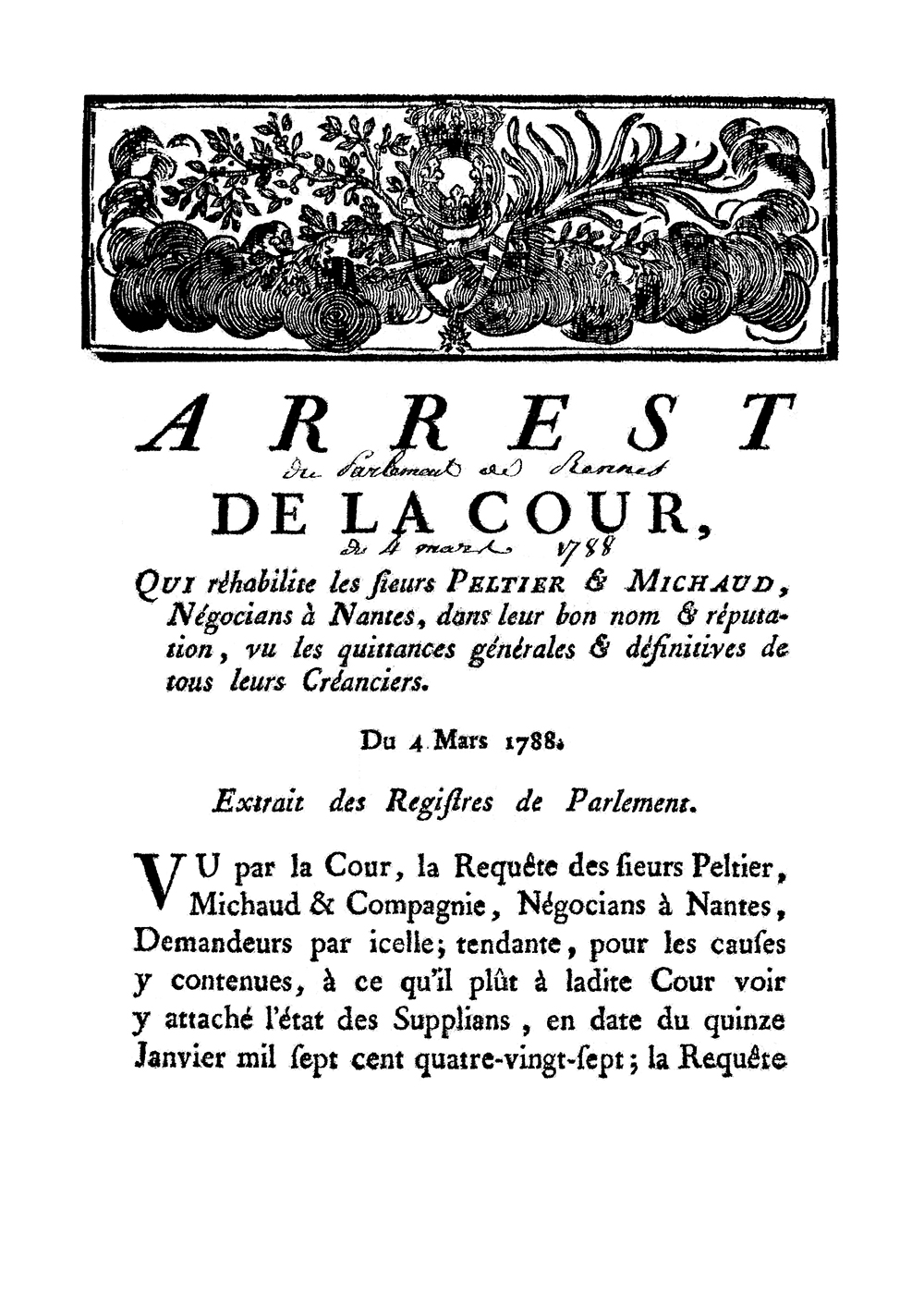 Arrêt du parlement de Bretagne